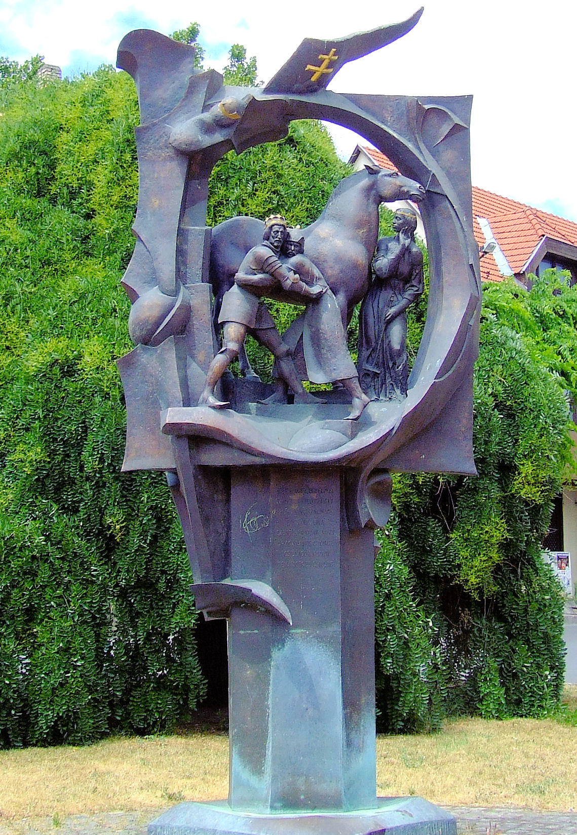 Szent László szobra Szekszárdon. A kompozició a Képes Krónika P iniciáléjának alapján készült. Nagy Benedek alkotása (2001).